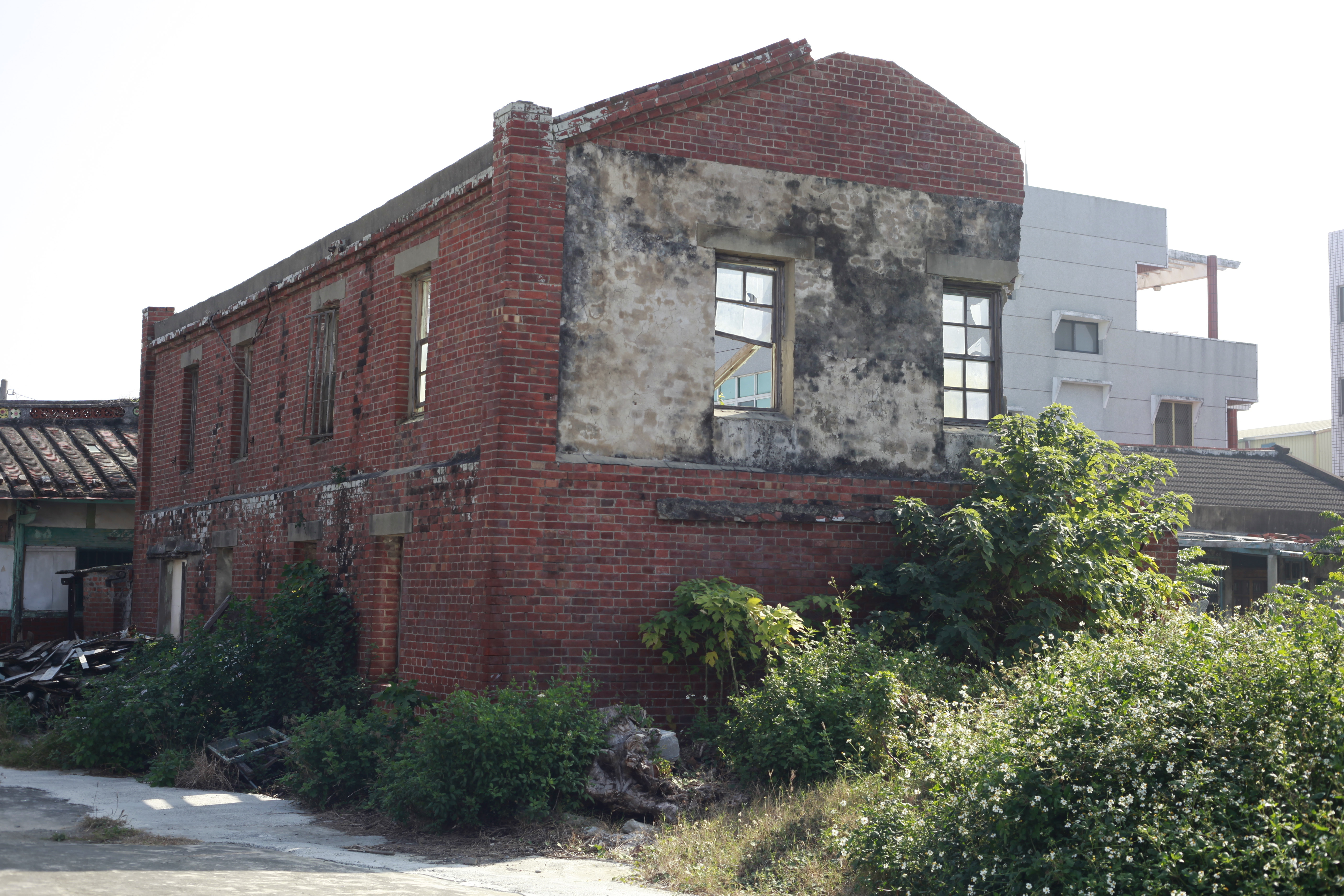 濟生病院被2015年8月8日的蘇迪勒颱風摧殘過後的景像。